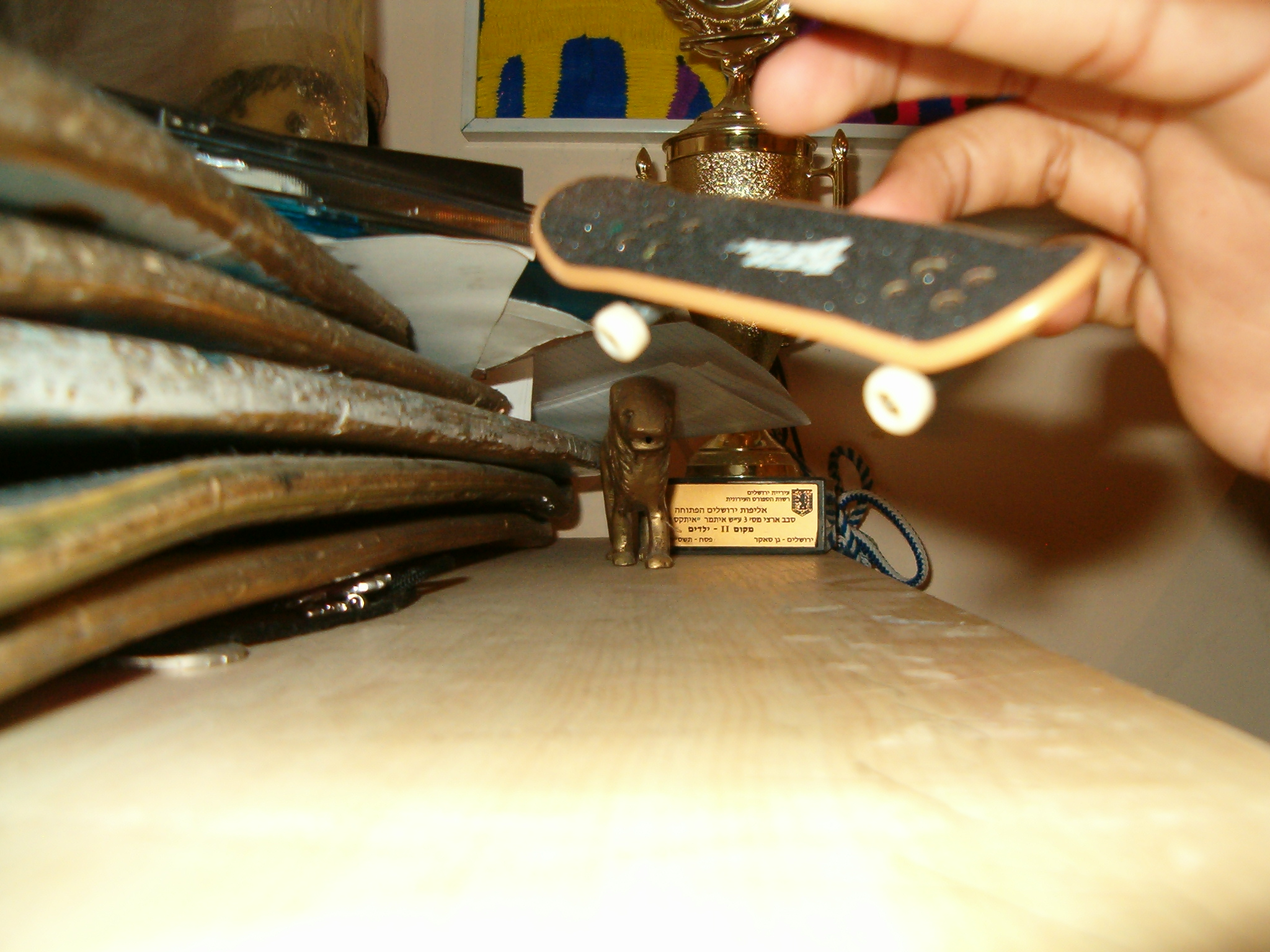 טריק עם סקייט אצבעות. צילם י.ש. 23:58, 20 אפריל 2006 (IDT)